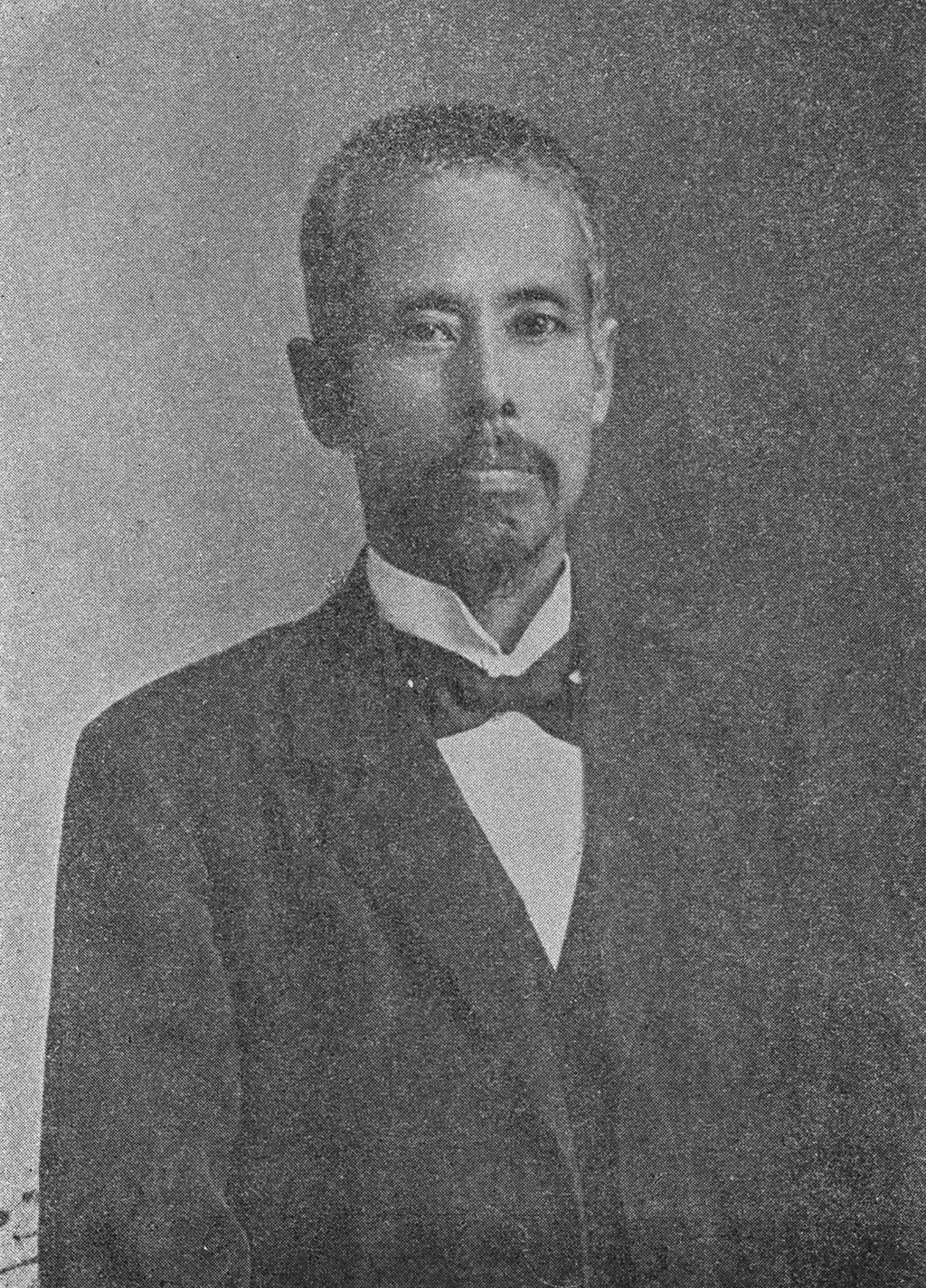 Portrait of Tokishige Hatsukuma (時重初熊, 1859 – 1913)